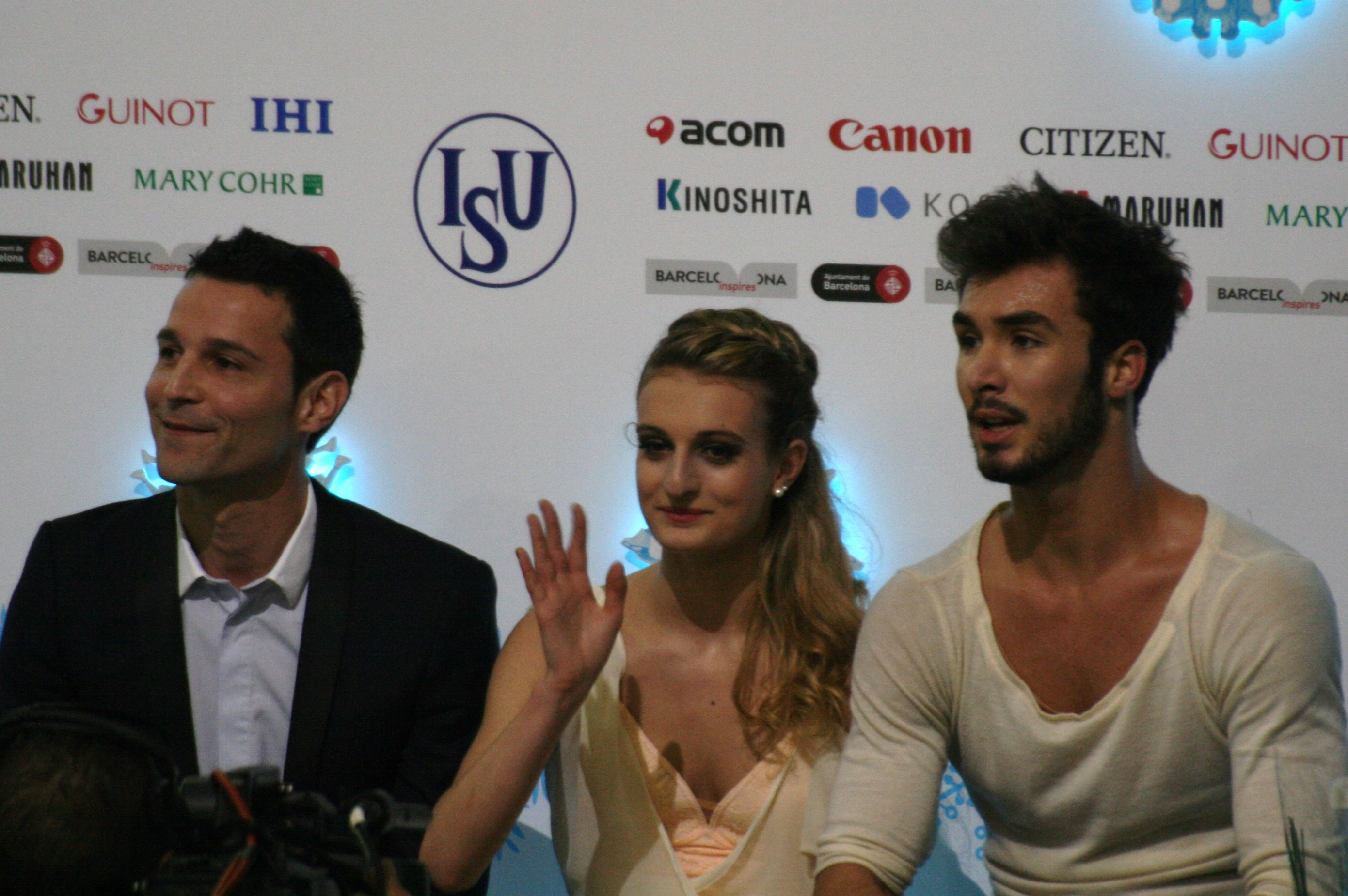 Габриэла Пападакис и Гийом Сизерон (Франция) на финале Гран-при по фигурному катанию 2014-2015.